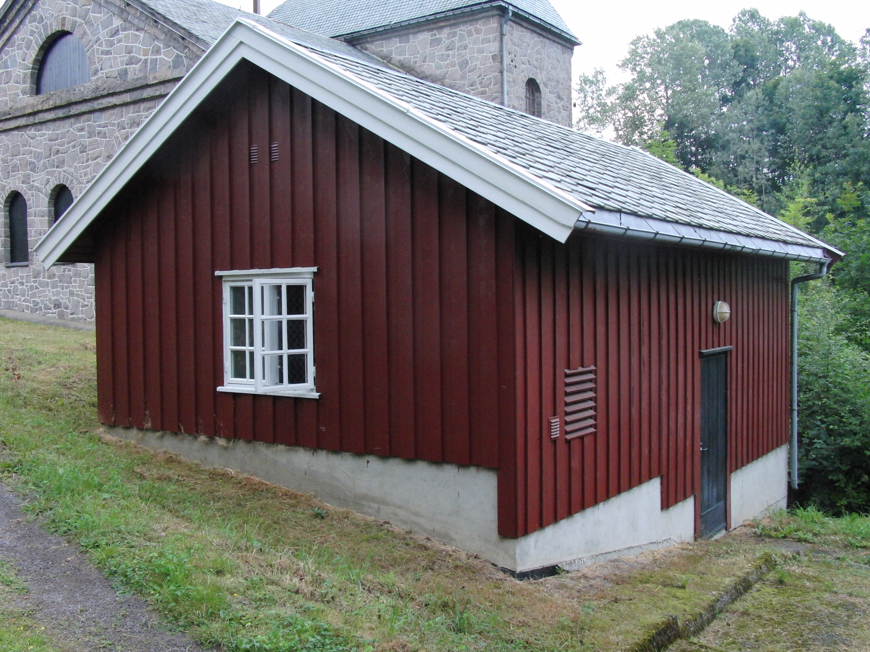 Verksfossen kraftverk, nytt 2002